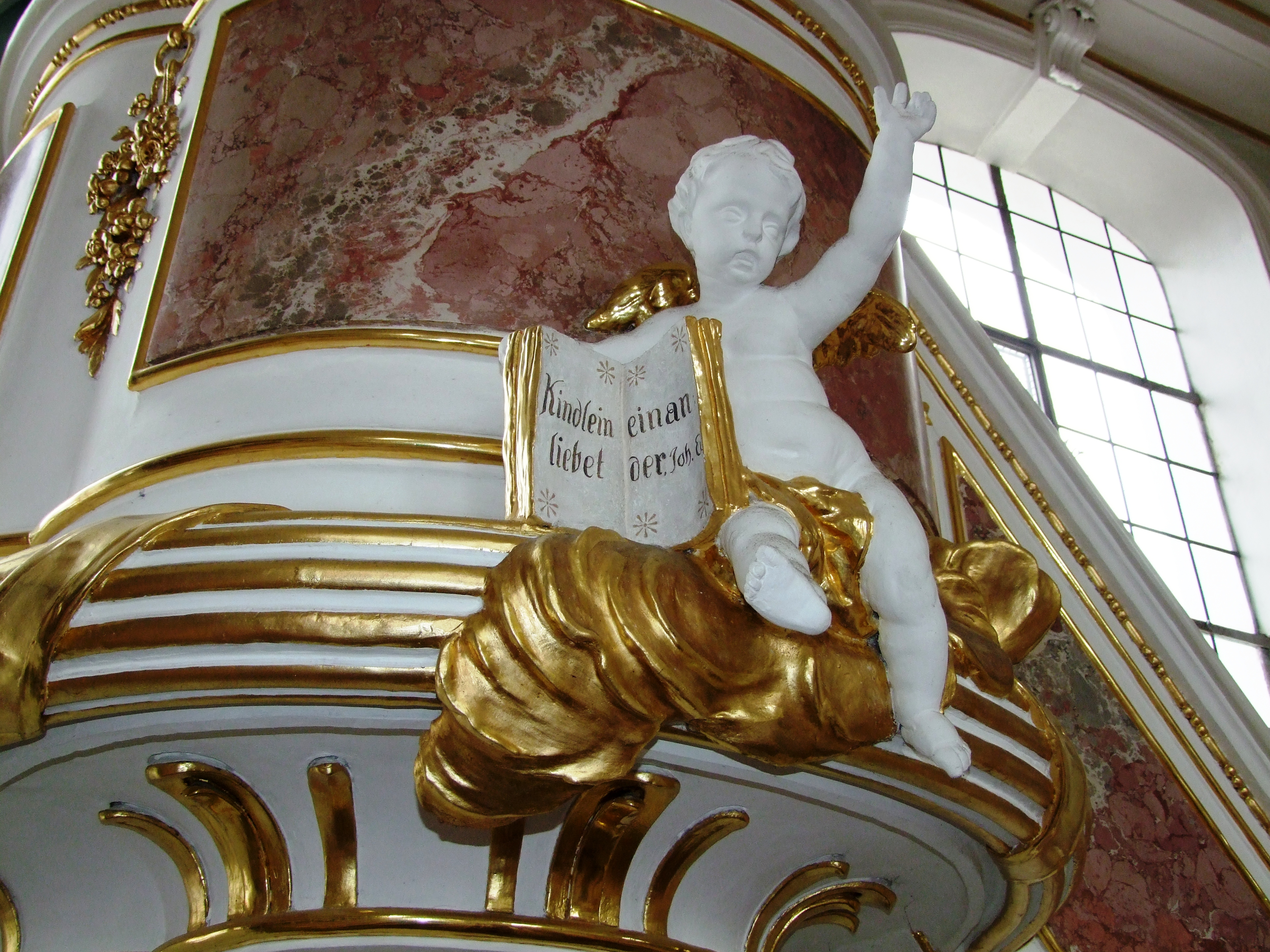 Die Zur-Heiligsten-Dreifaltigkeit-Kirche im oberschwäbischen Kronburg bei Memmingen.